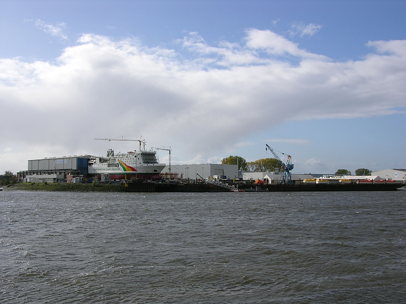 Ansicht Betriebsgelände Fr. Fassmer GmbH & Co. KG, Berne